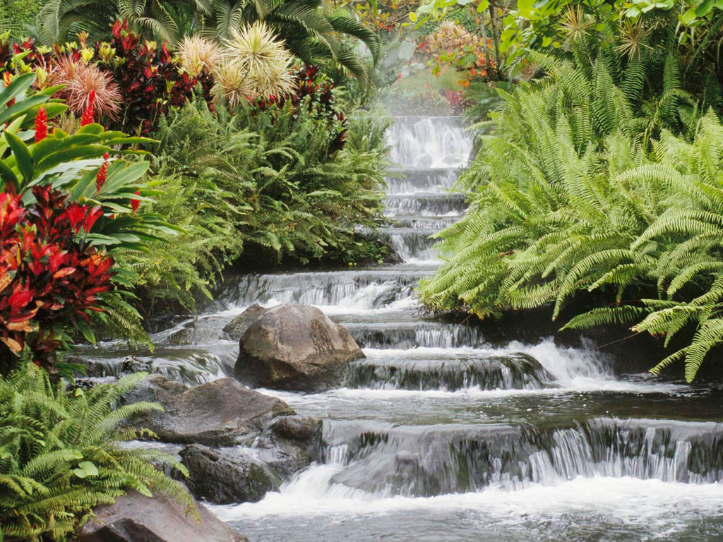 Imagine eșantion